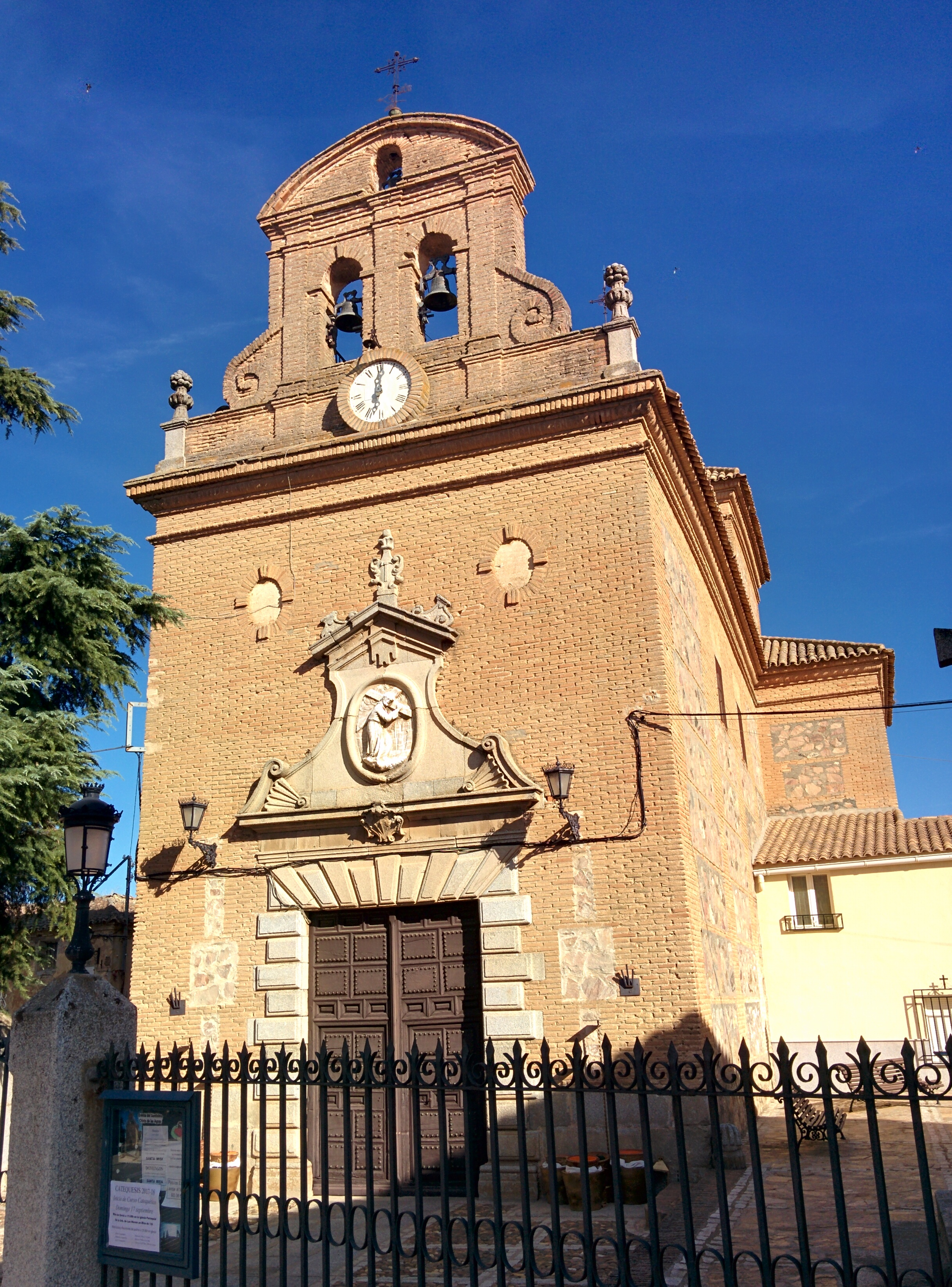 Ermita del Santísimo Cristo de las Aguas, en Nambroca (Toledo, España).